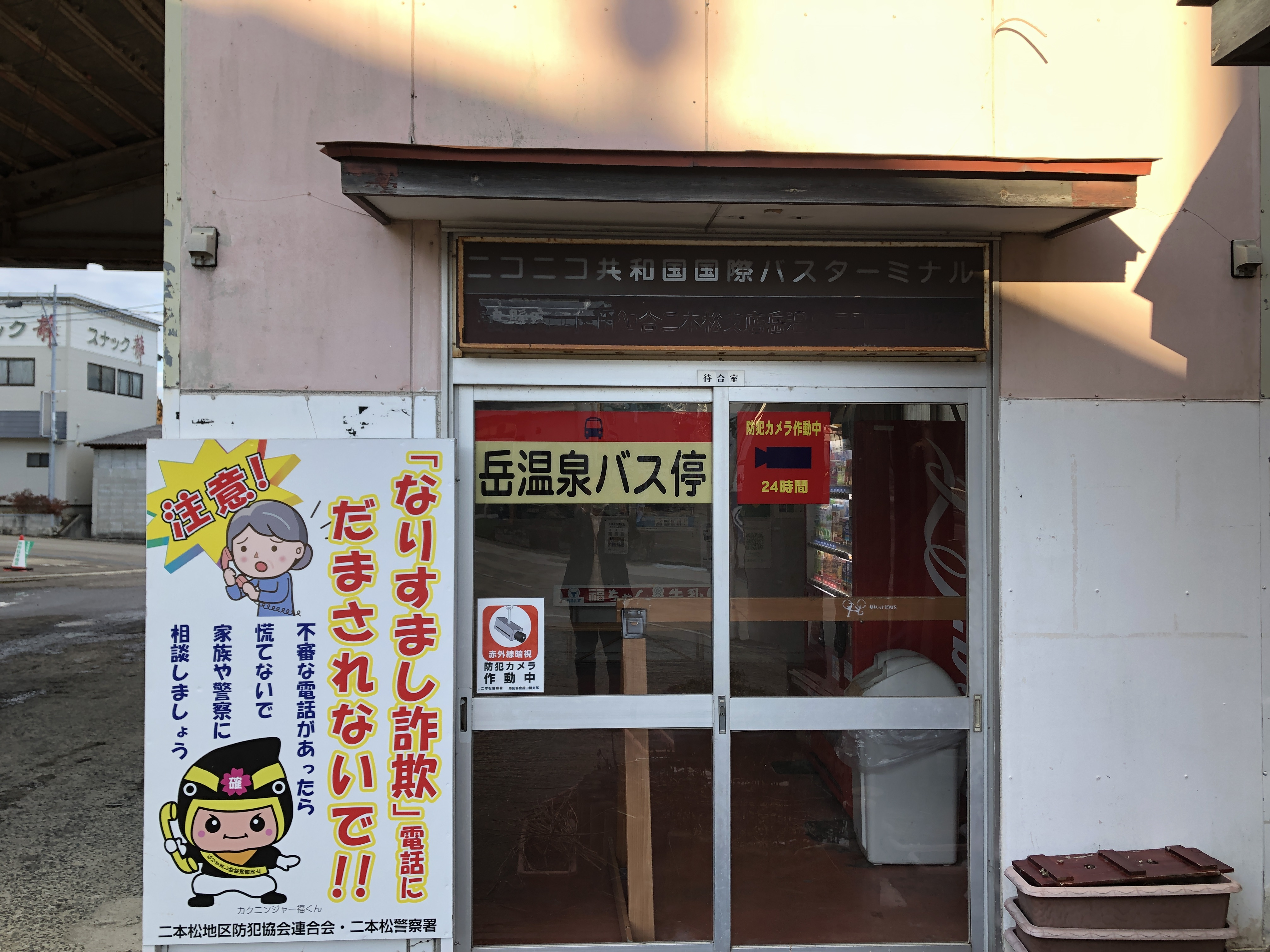 ニコニコ共和国に関する写真